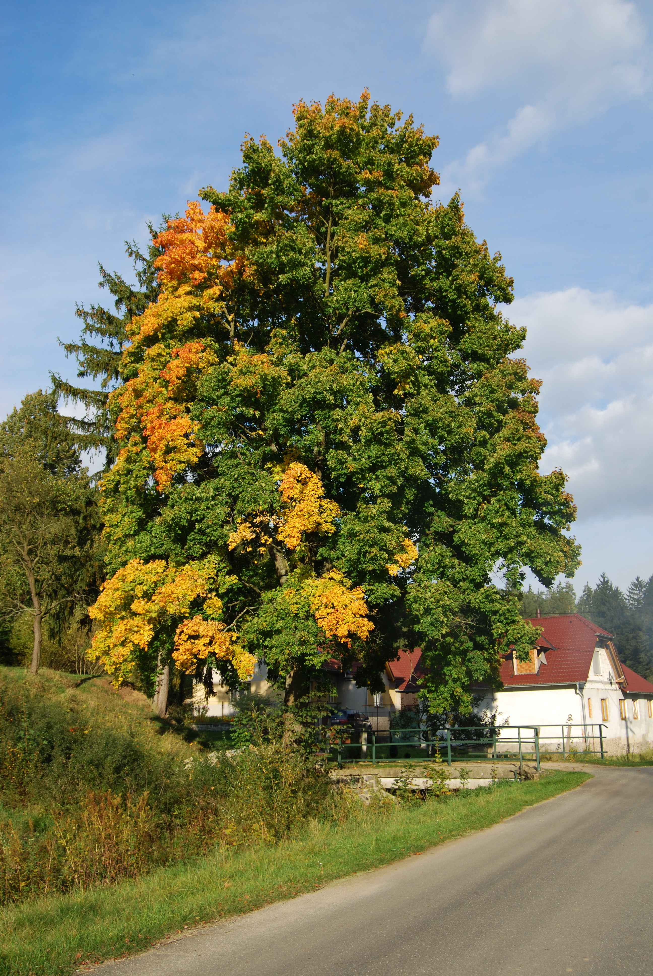 Struhy je část obce Vlastec v okrese Písek. Česká republika.